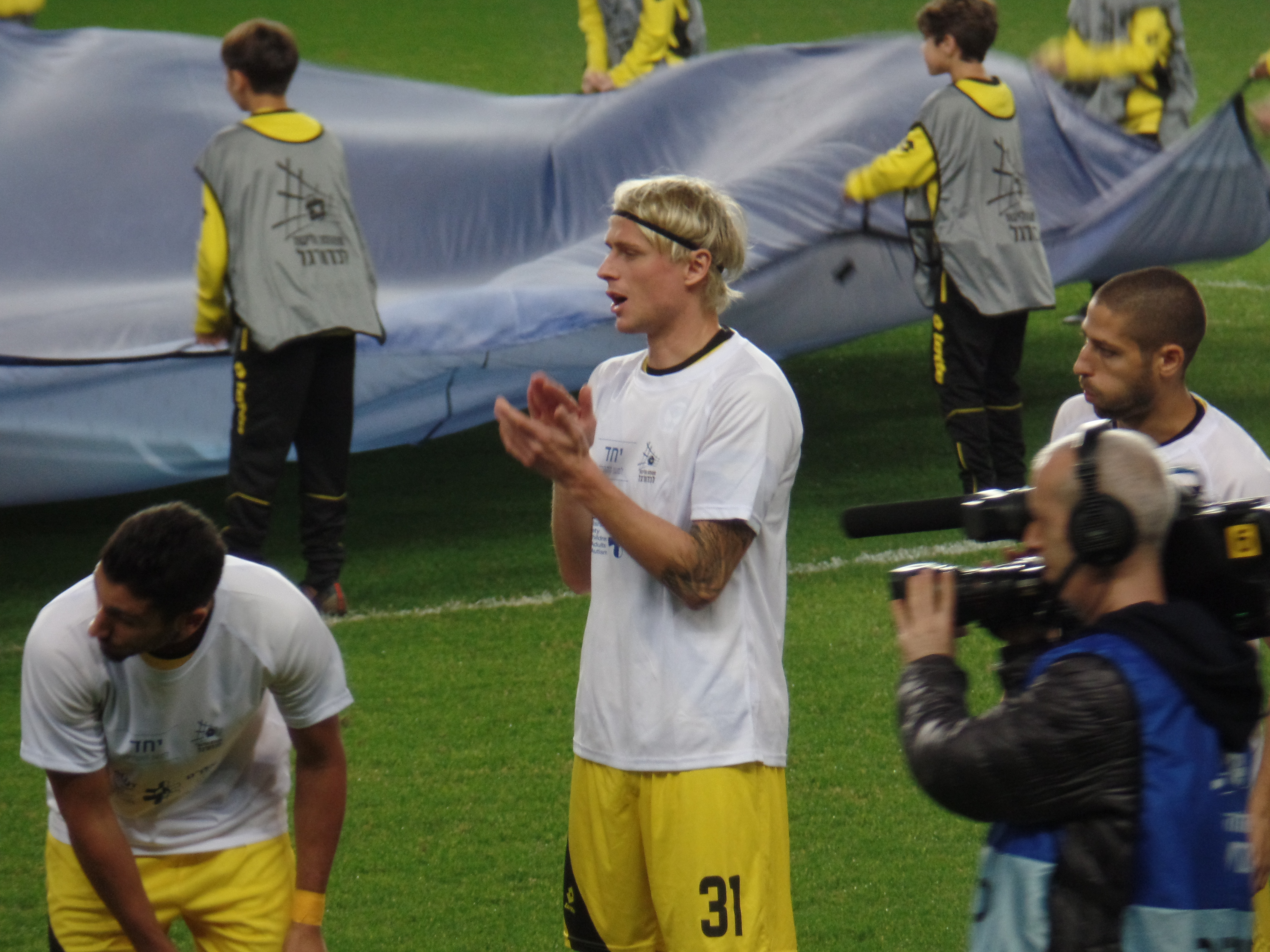 טים הויבך במדי מכבי נתניה